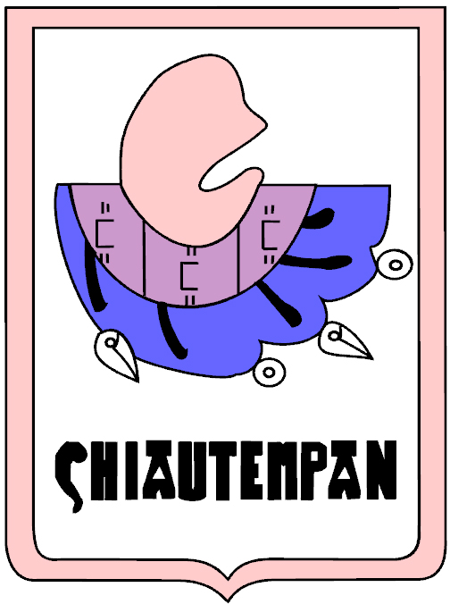 Escudo del municipio de Chiautempan